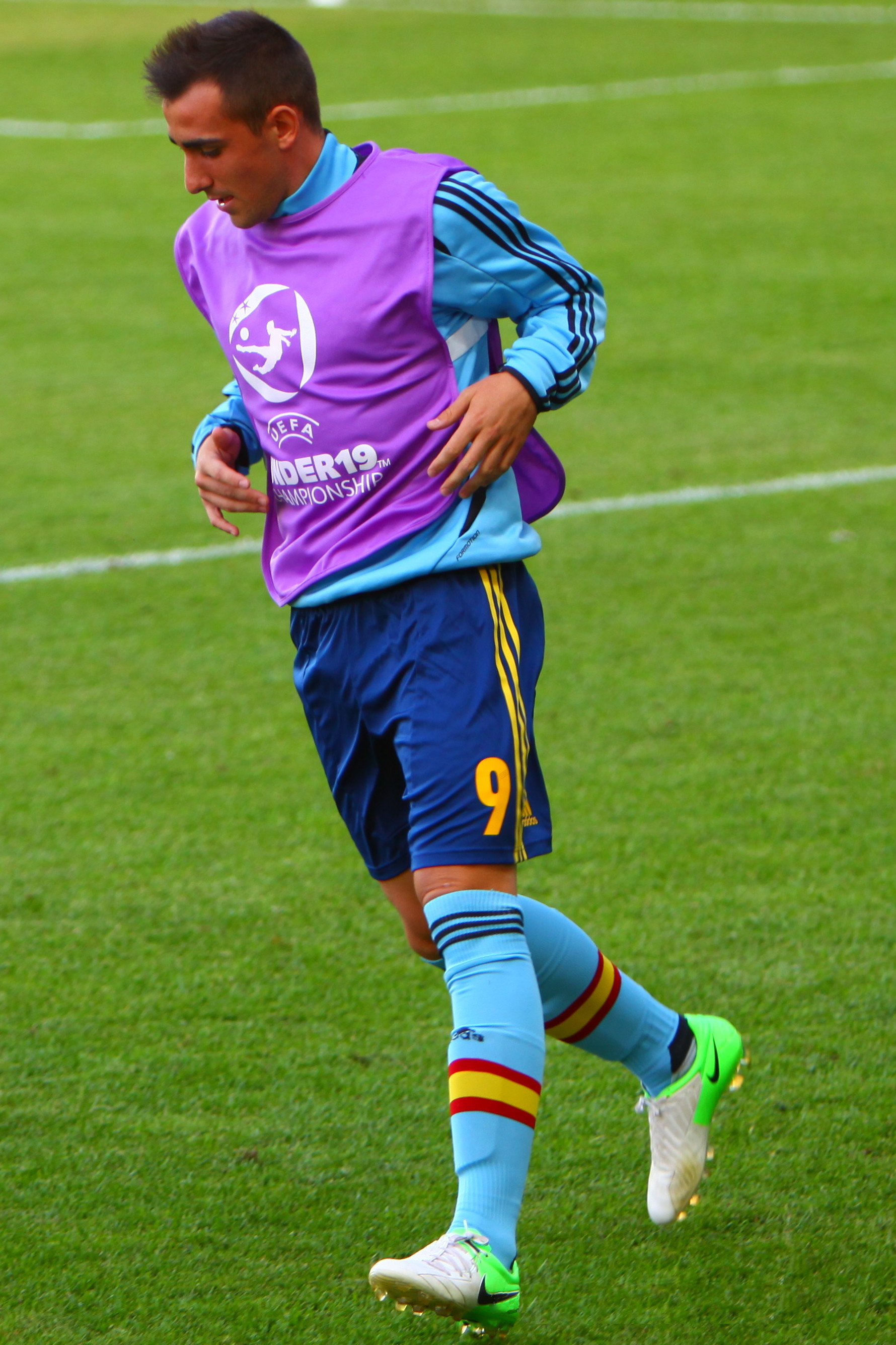 U-19 Portugal vs Spain.